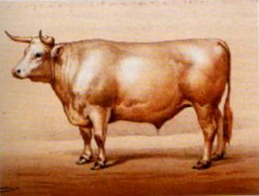 Boeuf de race charolaise